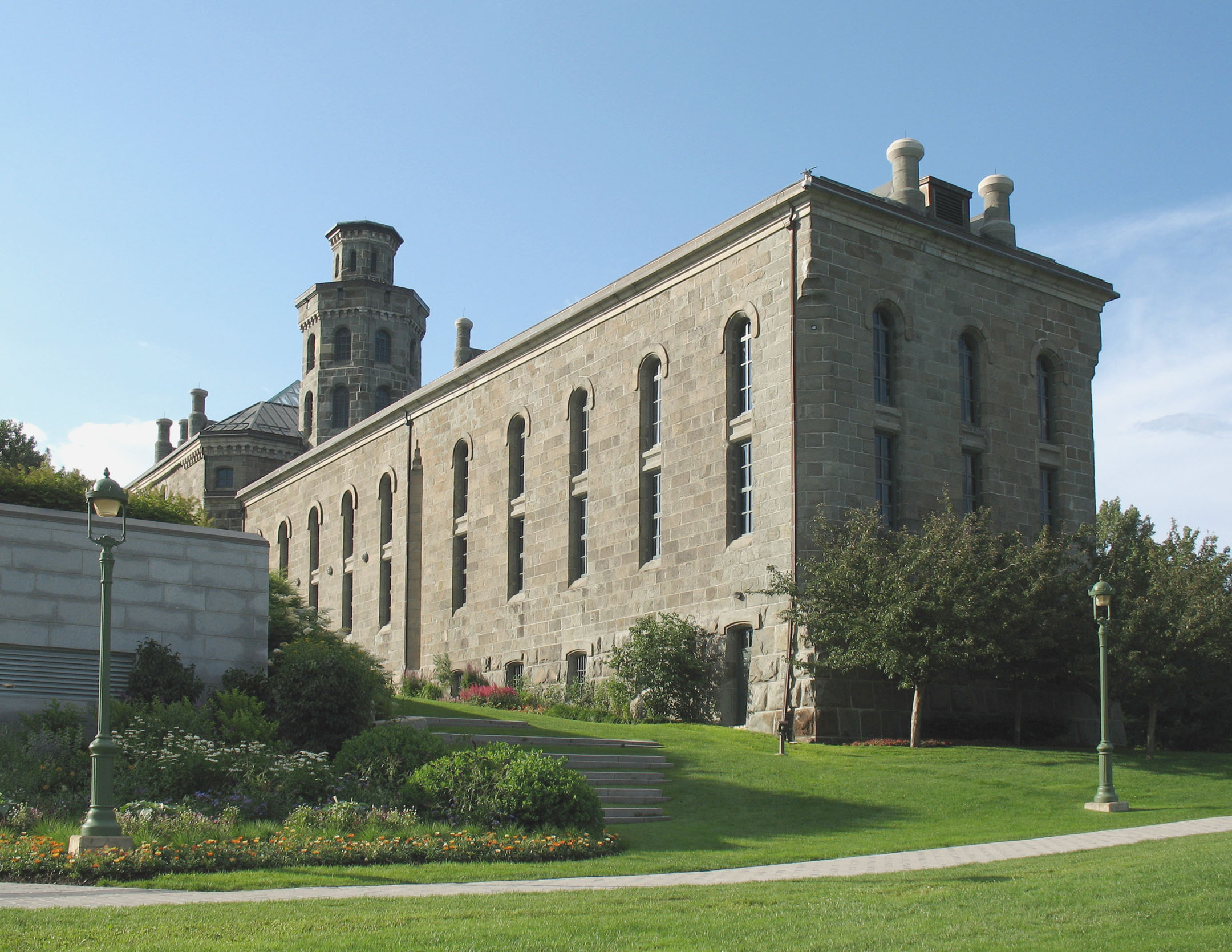 Musée national des beaux-arts du Québec, Pavillon Charles-Baillairgé, ancienne prison de Québec. Ville de Québec, province de Québec. Canada